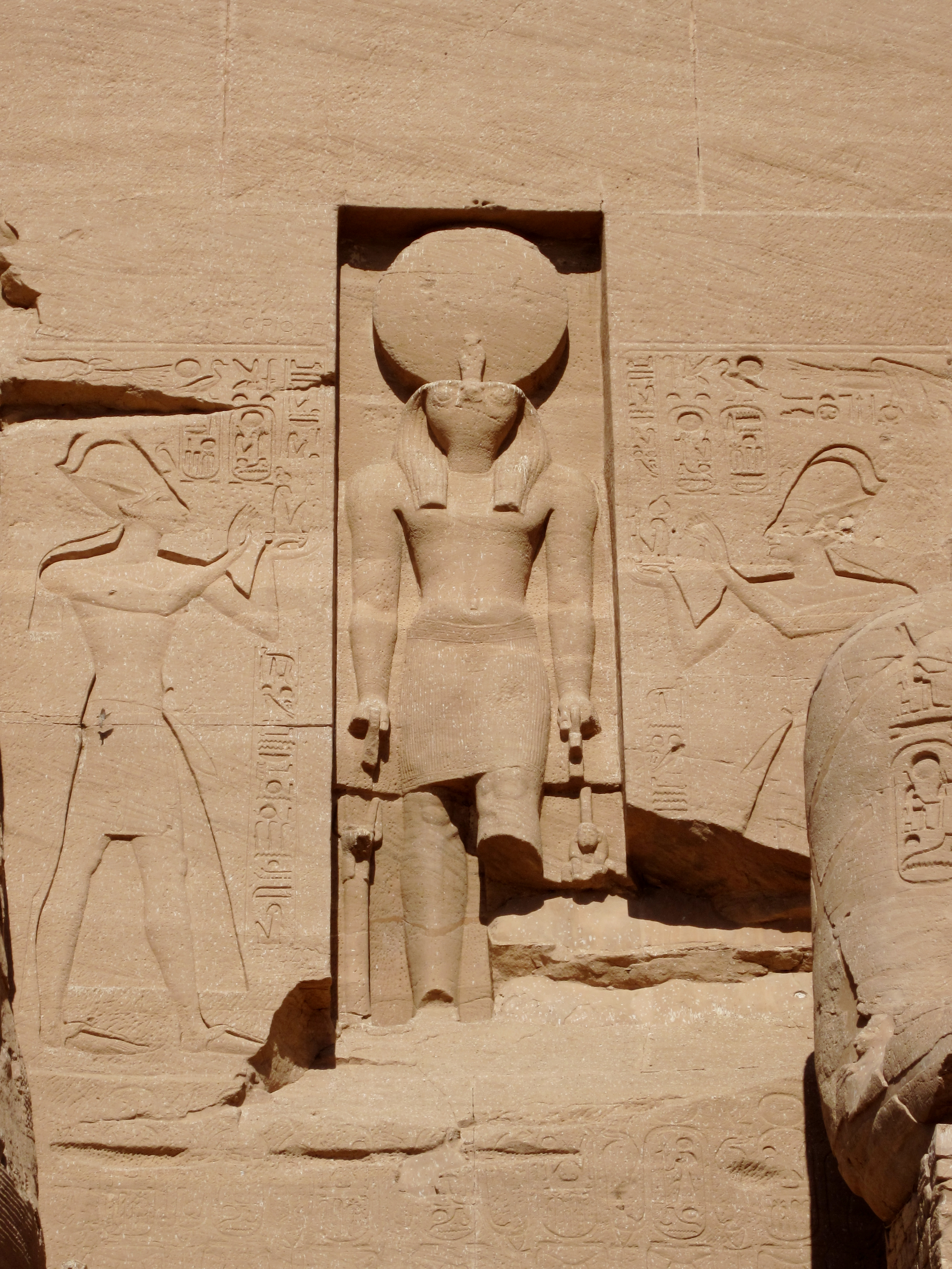 Darstellung von Re-Harachte oberhalb des Eingangs am Großen Tempel von Abu Simbel, Ägypten